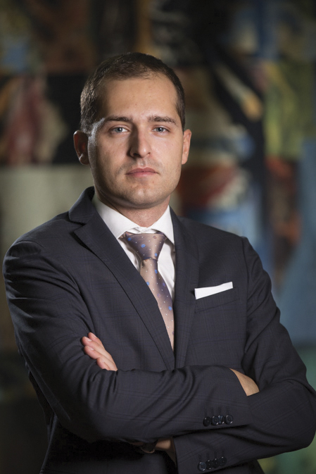 Српски (ћирилица): др Лука Батуран